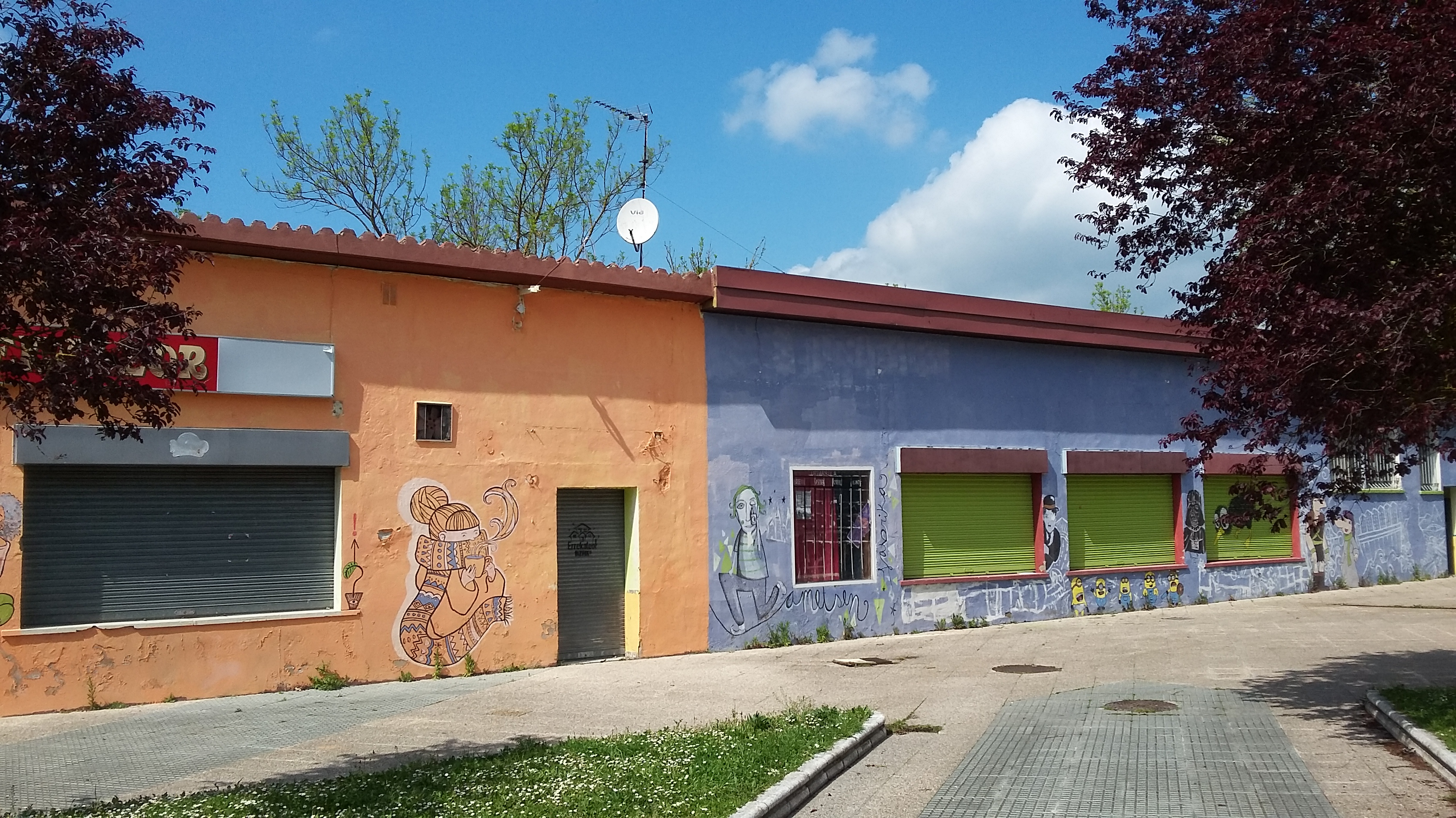 Barrio de Errekaleor, Vitoria-Gasteiz, Álava, País Vasco (España). Centro de servicios.